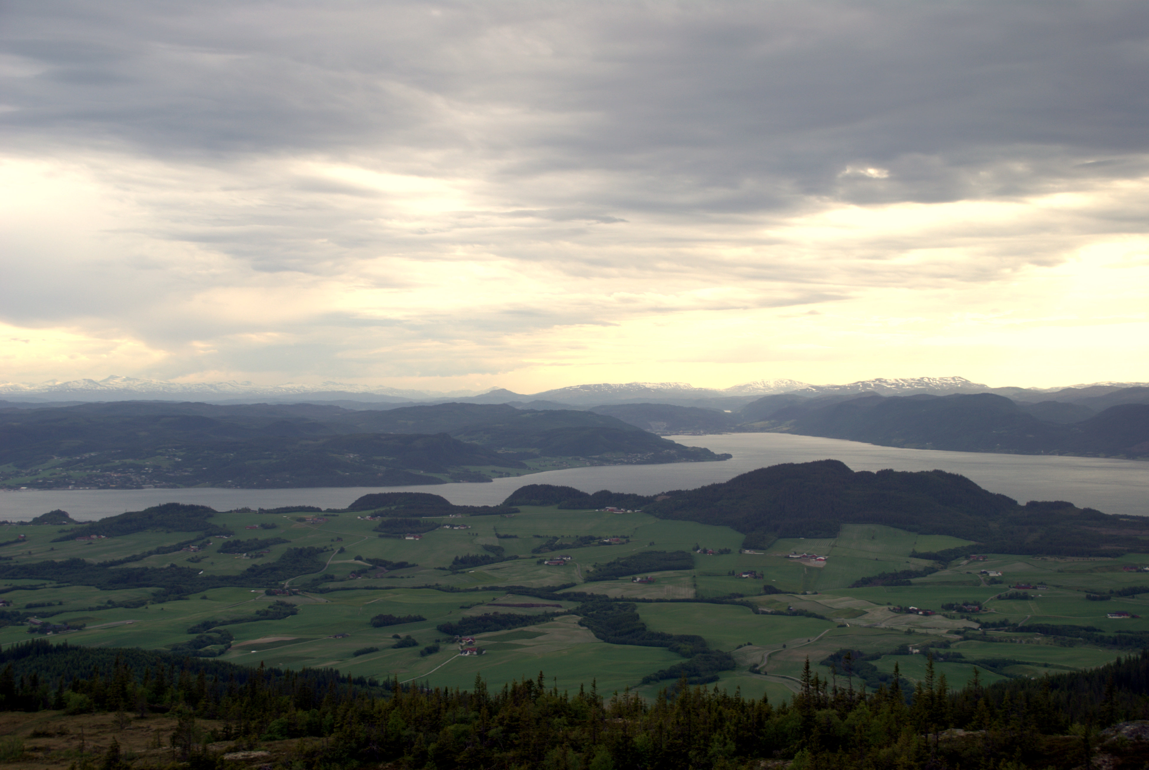 Byneset med Gaulosen og Orkdalsfjorden. Bilde tatt fra Storheia i Bymarka i Trondheim.